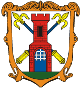 Znak obce Loučeň